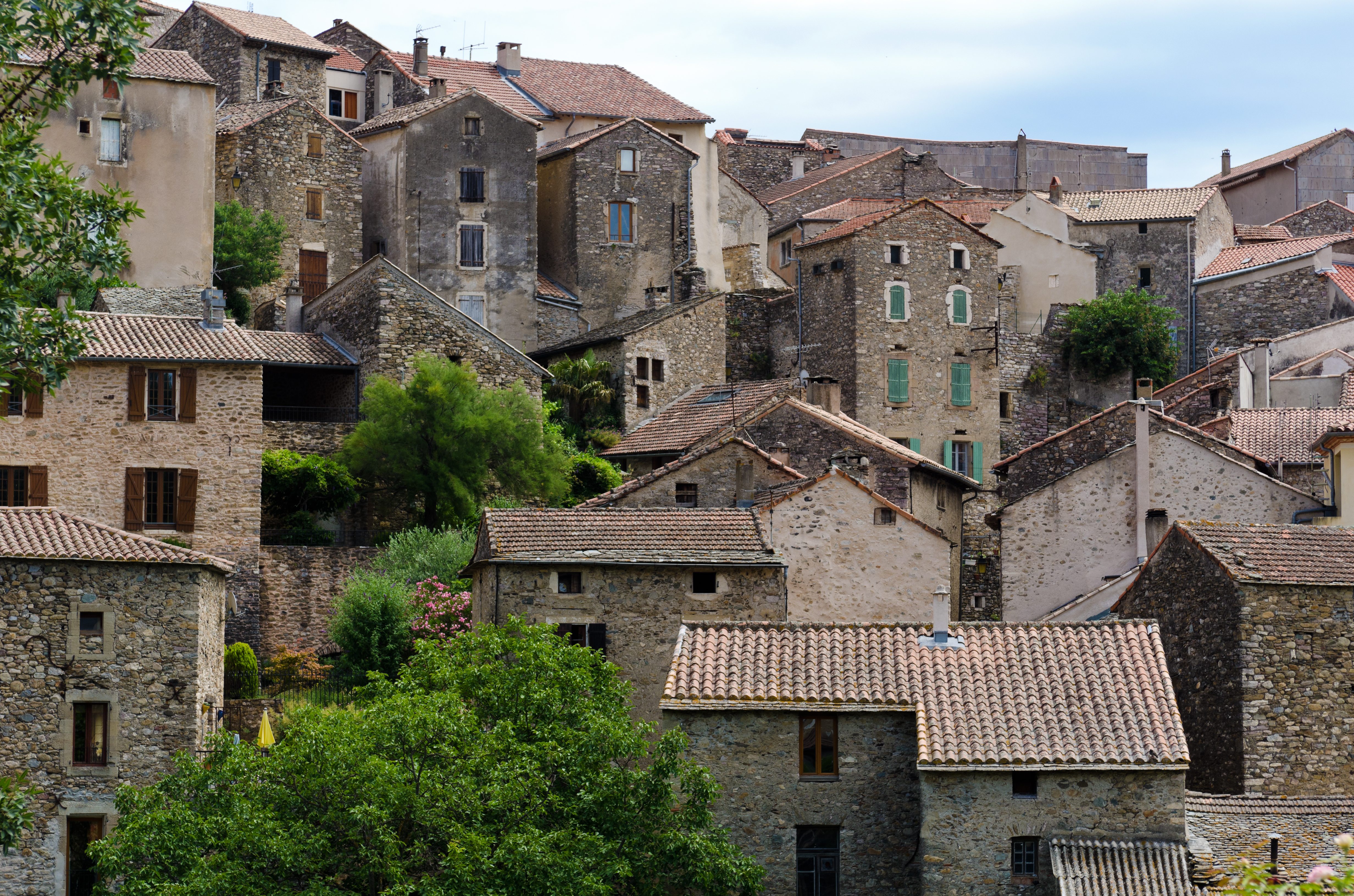 Olargues houses